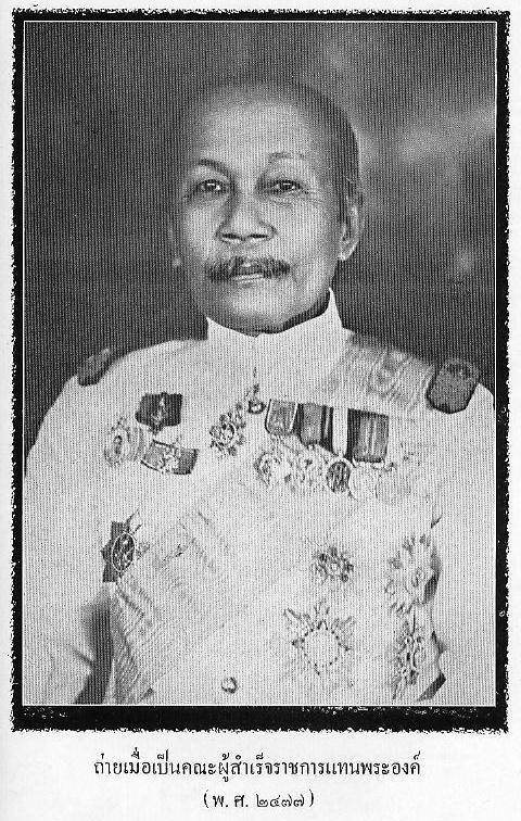 เจ้าพระยายมราช (ปั้น สุขุม) ติดอินทรธนูมหาอำมาตย์นายกในเครื่องแบบเต็มยศขาว เป็นอินทรธนูรูปช่อชัยพฤกษ์กับจักรกับตรีสีเงินด้ามสอดกัน(จักรี)พาดกลางอินทรธนู